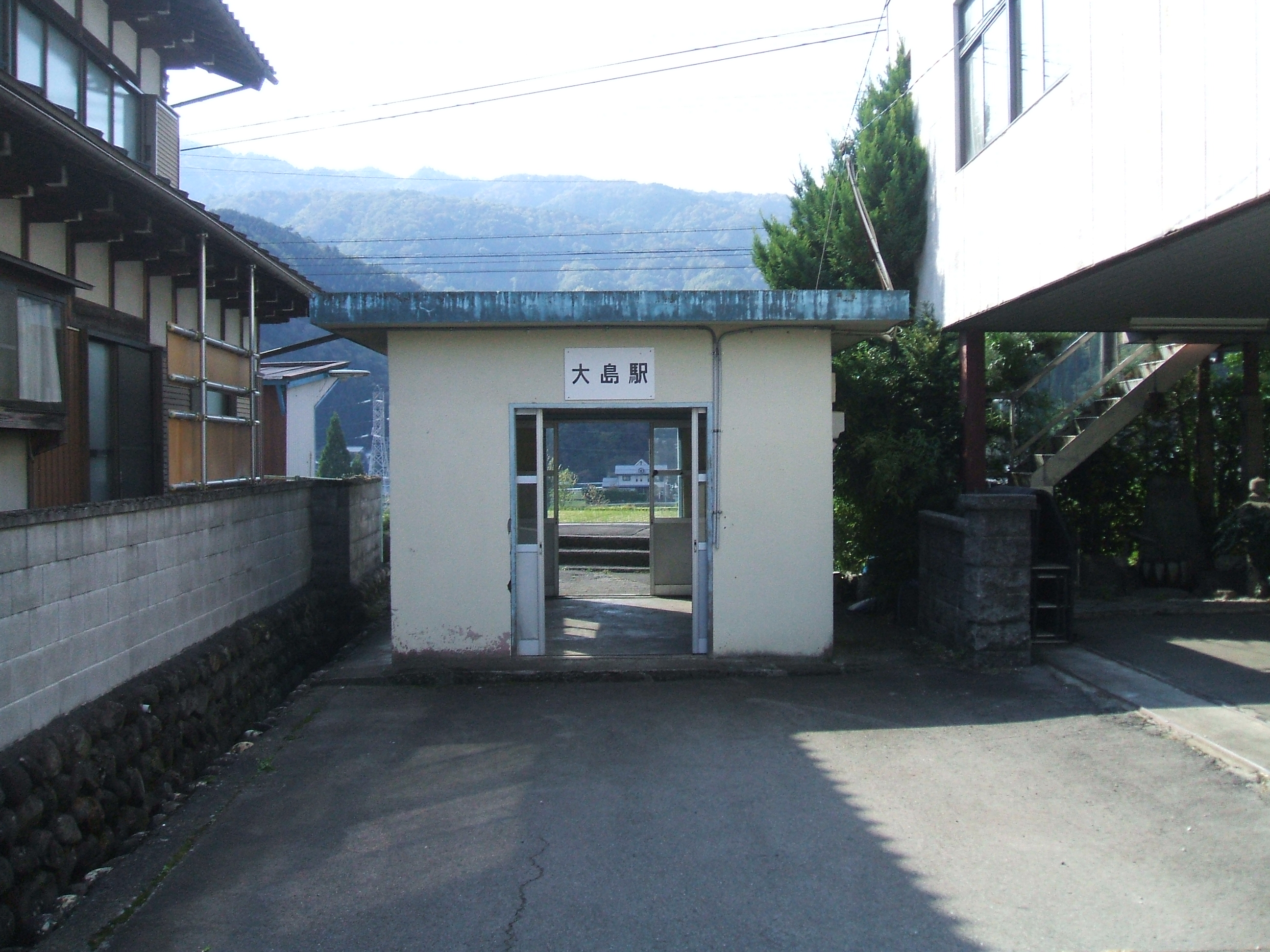 大島駅駅舎